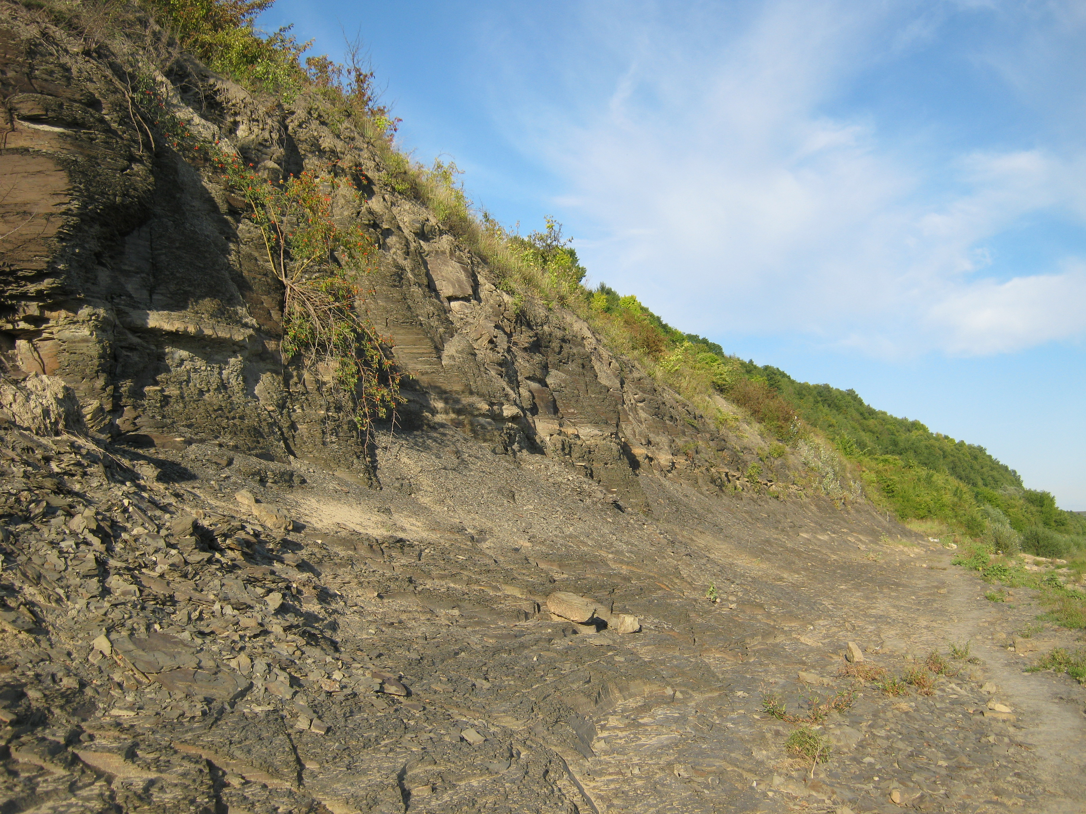 Відслонення в Дністровському каньйоні поблизу села Синькова Заліщицького району Тернопільської області